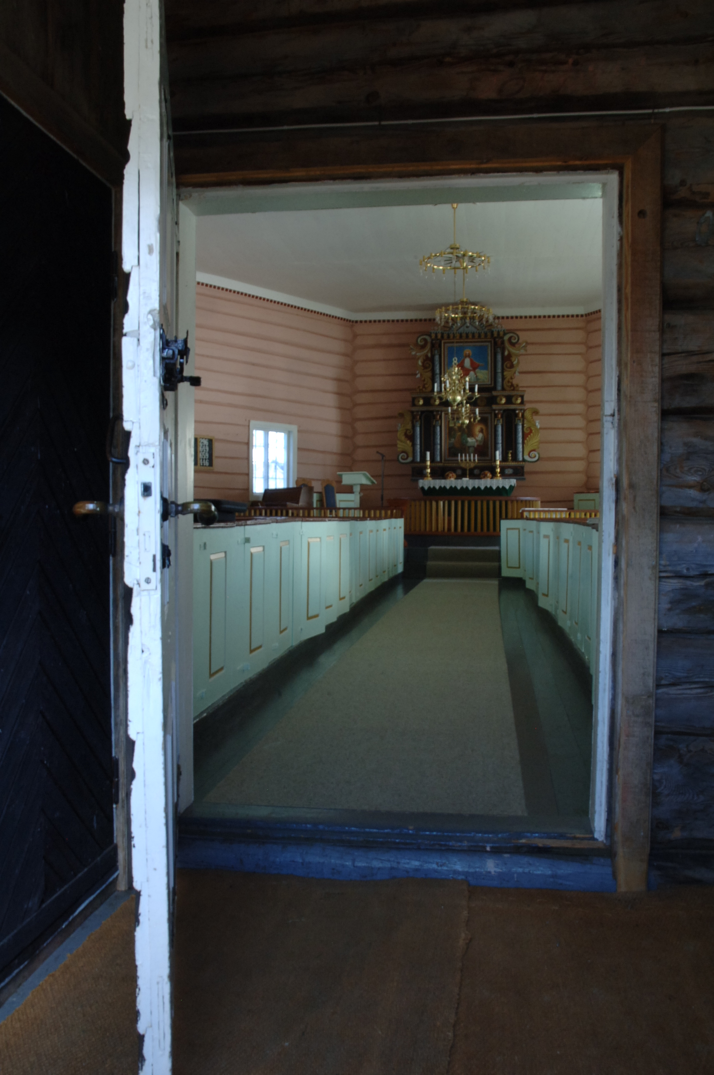 Kyrkjerommet i Sandnes kyrkje, Åraksbø sett frå våpenhuset